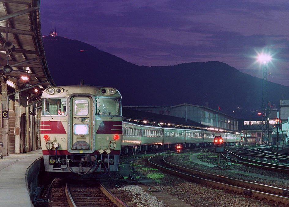 国鉄キハ80系特急形気動車 特急「おおとり」